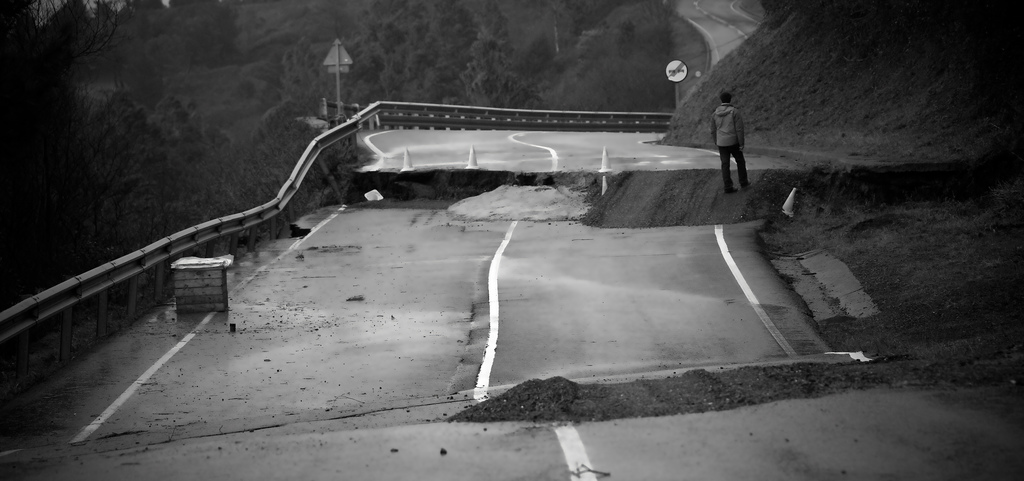 Temporal Euskadi 24-01-09